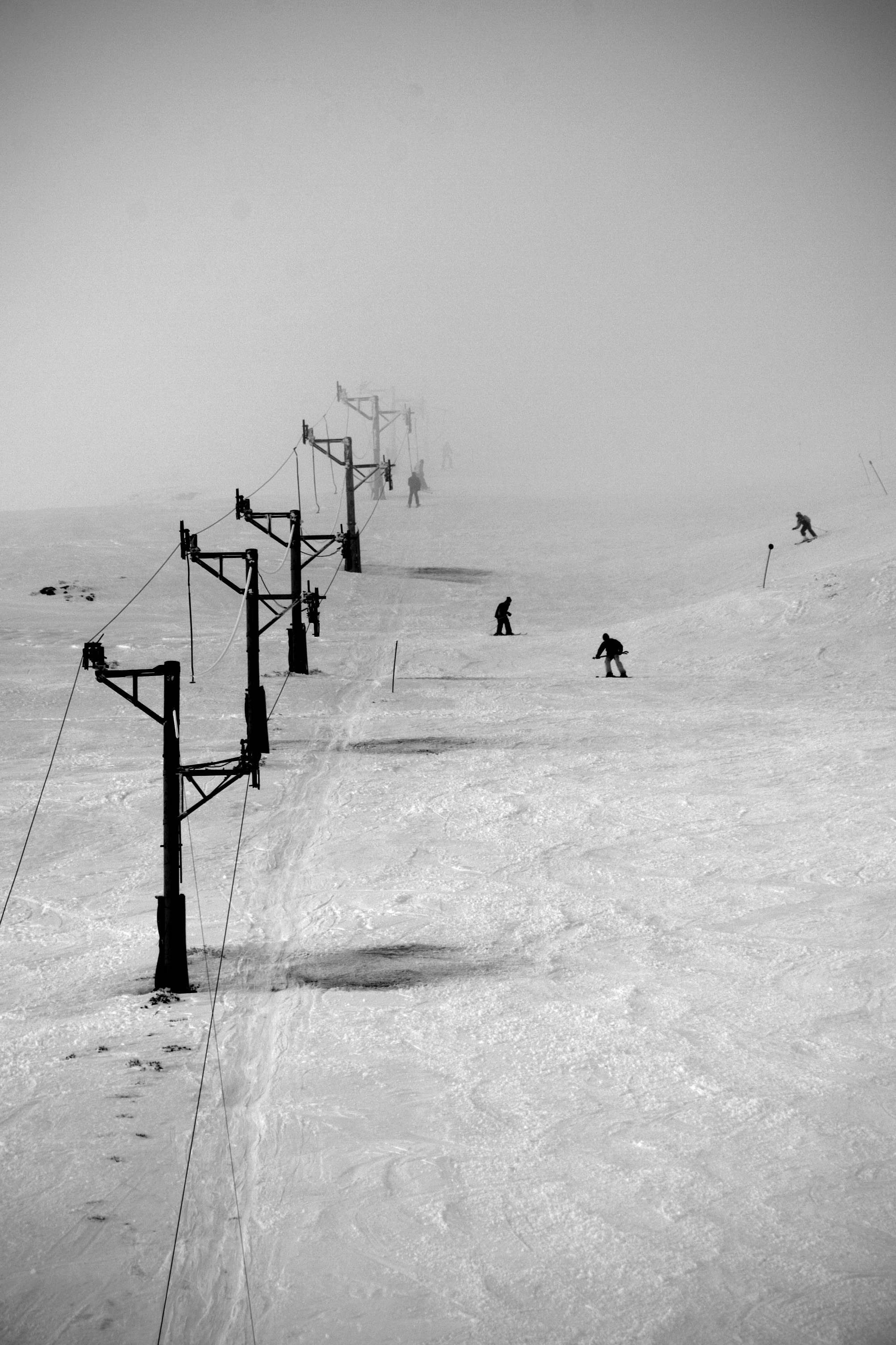 Estación de esquí de La Lunada, en la provincia de Burgos (España)